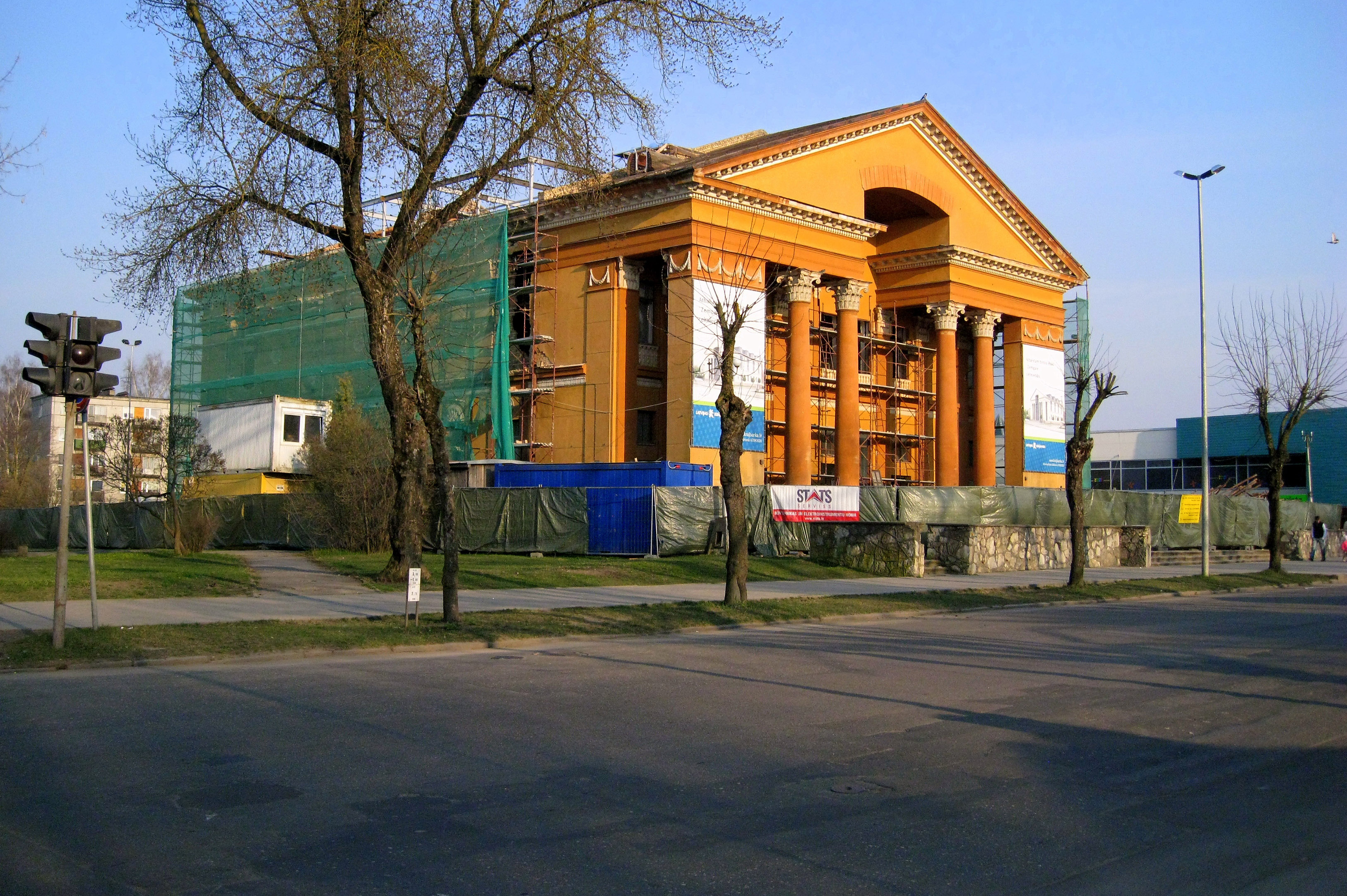 "Zemgale" - Former Jelgava Cinema